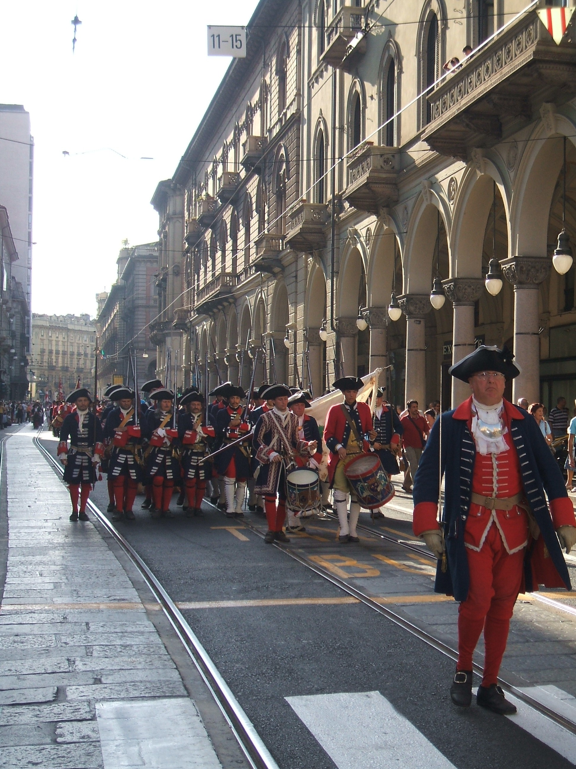 Rievocazione storica dell'Assedio di Torino del 1706, particolare della parata militare in Via Pietro Micca, a Torino: esercito piemontese